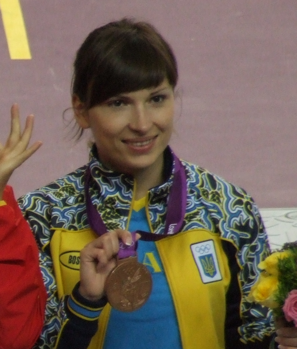 Olena Kostevych au JO de Londres 2012